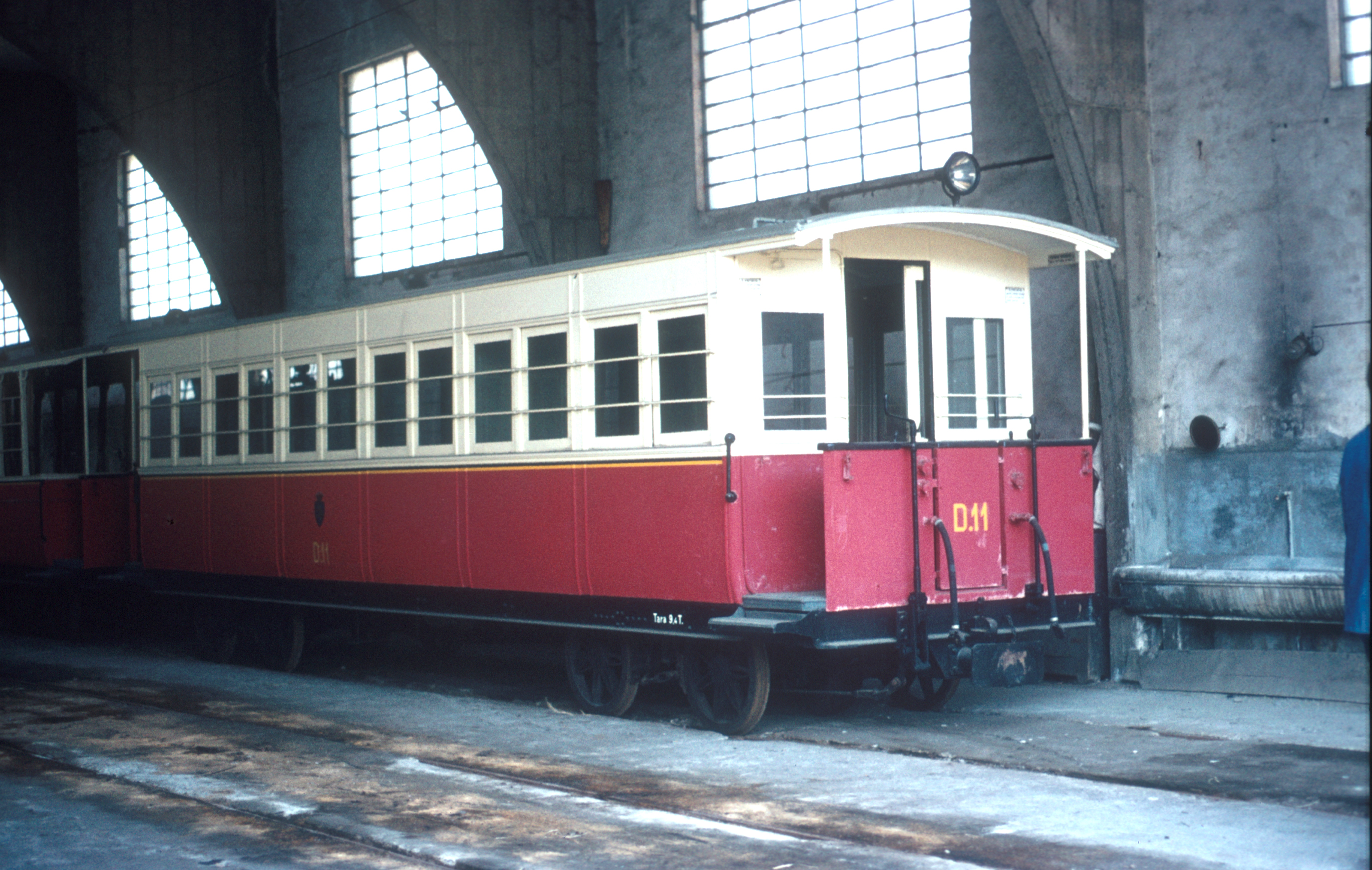 Tandradbahn Sassi-Superga rijuig D.11 op 16 mei 1976. (dia: 31949)